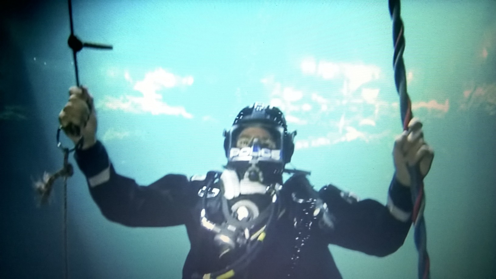 Reševanje podvodnih žrtev. / en: Saving underwater victims